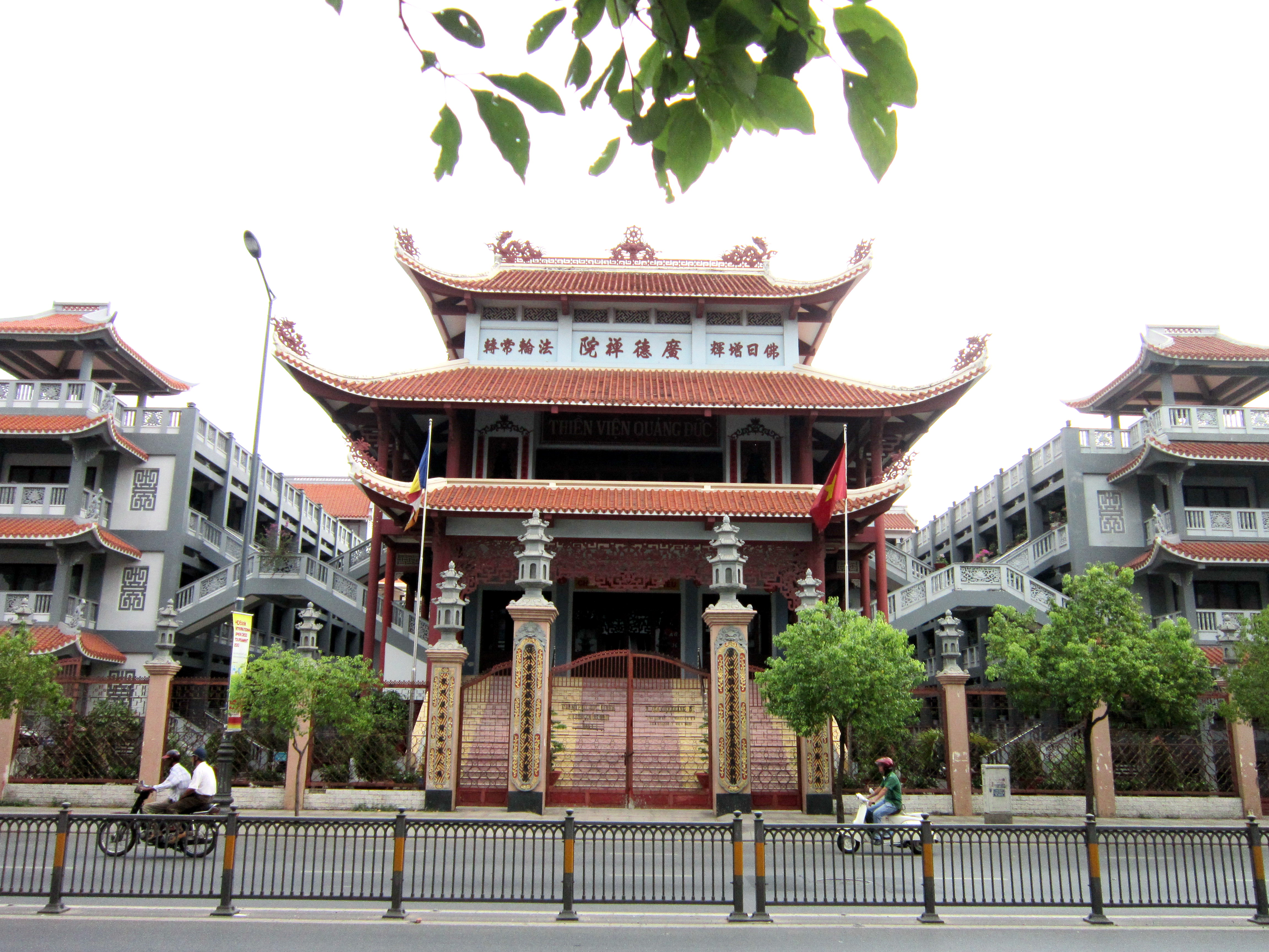 Thiền viện Quảng Đức thuộc hệ phái Bắc tông, hiện tọa lạc ở số 294 Nam Kỳ Khởi Nghĩa, thuộc phường 8, quận 3, Thành phố Hồ Chí Minh, Việt Nam.